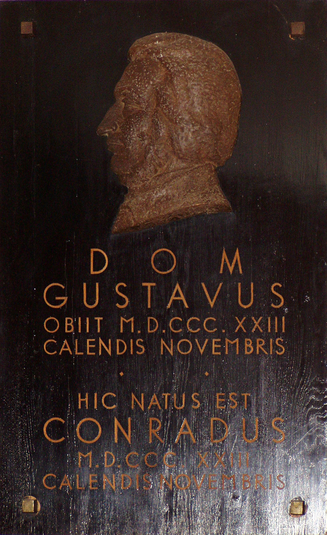 Tablica w celi, w której więziono Adama Mickiewicza - Wilno, Klasztor Bazylianów